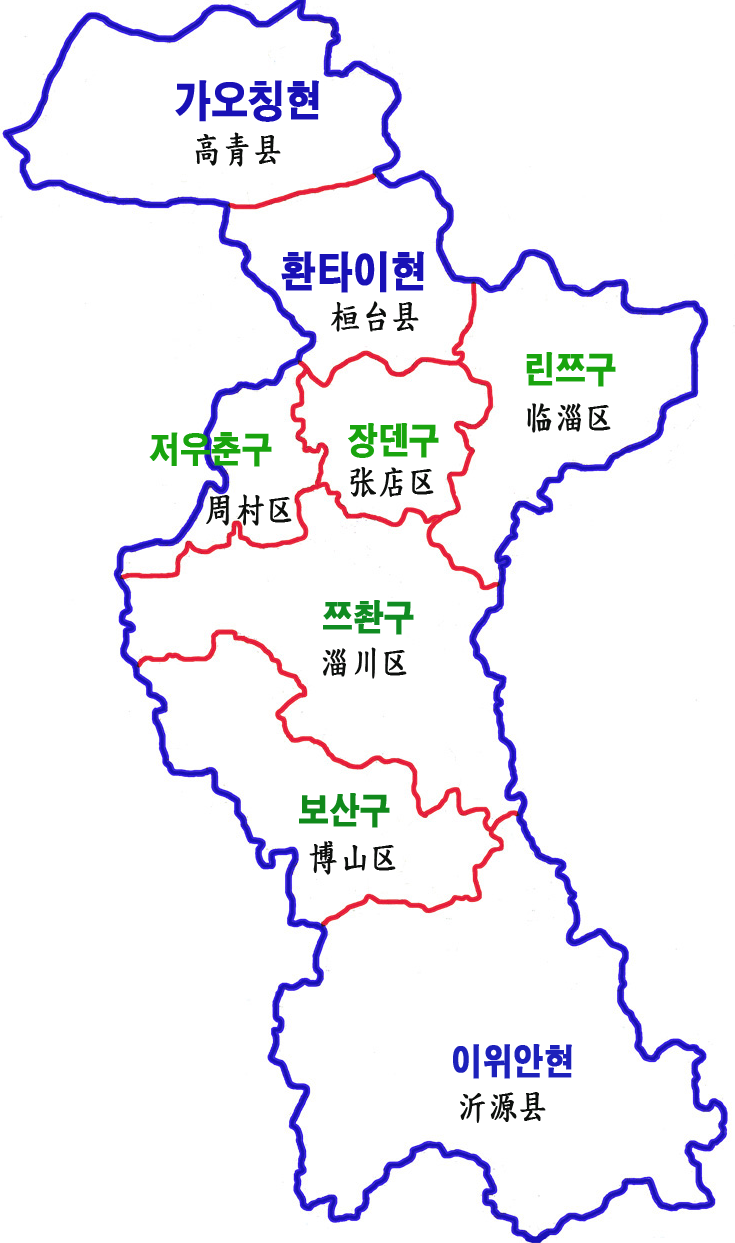 산둥성 쯔보시 현급구역